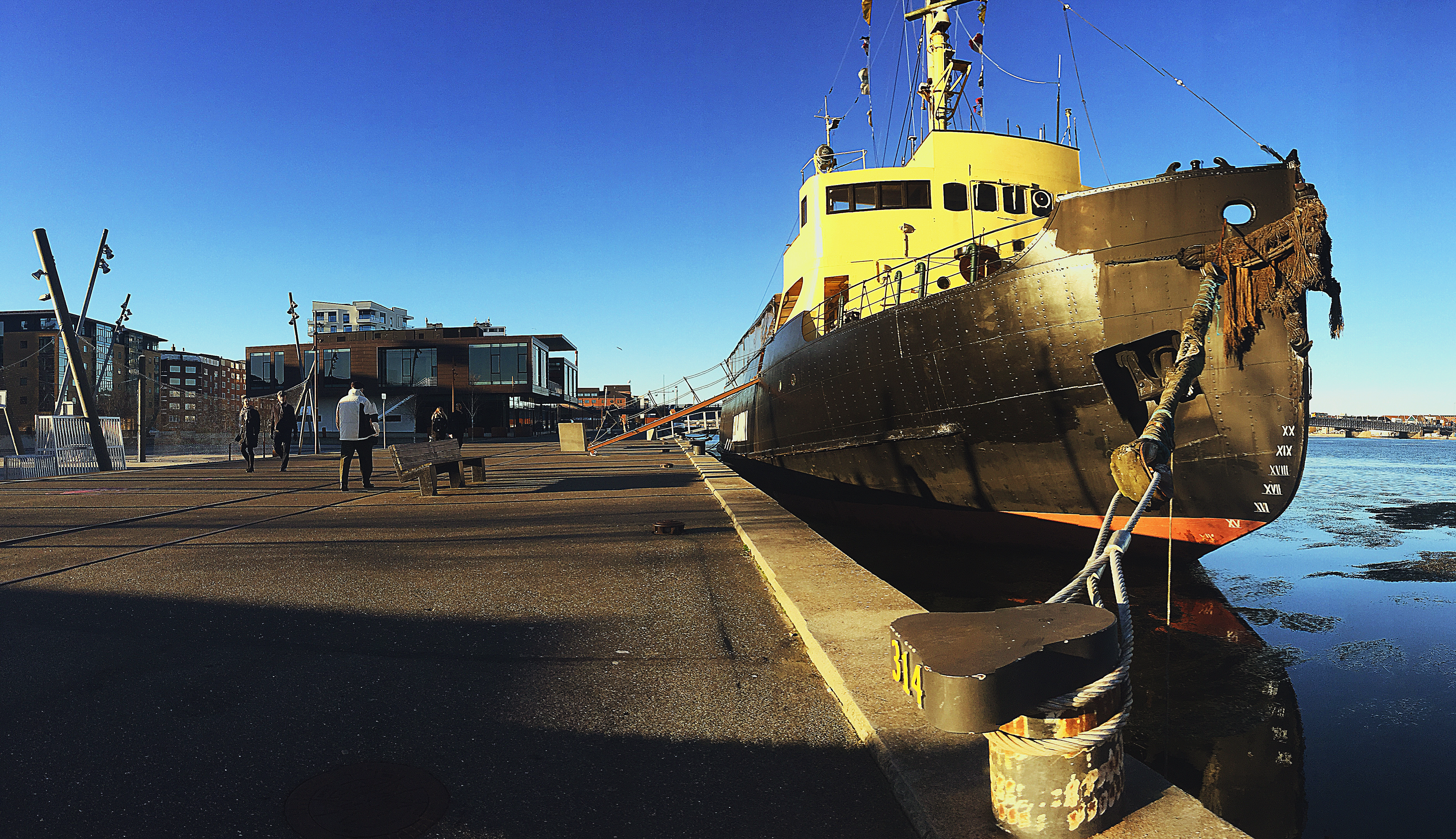 Placering ud for Jomfru Ane Parken.